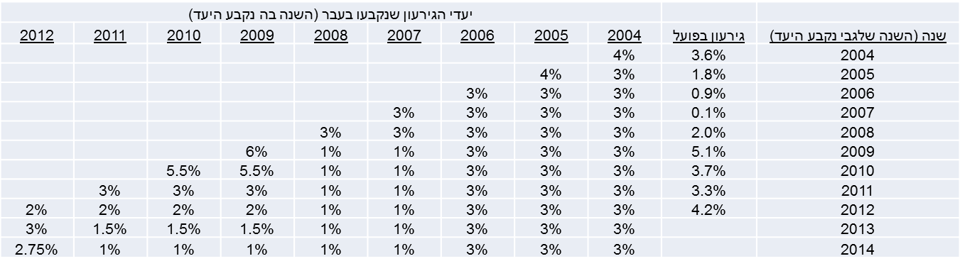 יעדי הגירעון בישראל לאורך השנים